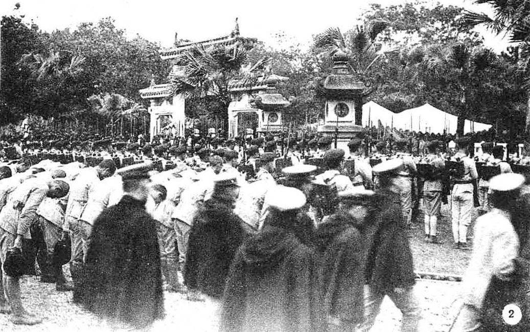 中文（台灣）: 建功神社為台灣日治時期設立於台北市南門町的神社，圖為1934年建功神社祭時的學生參拜景象。